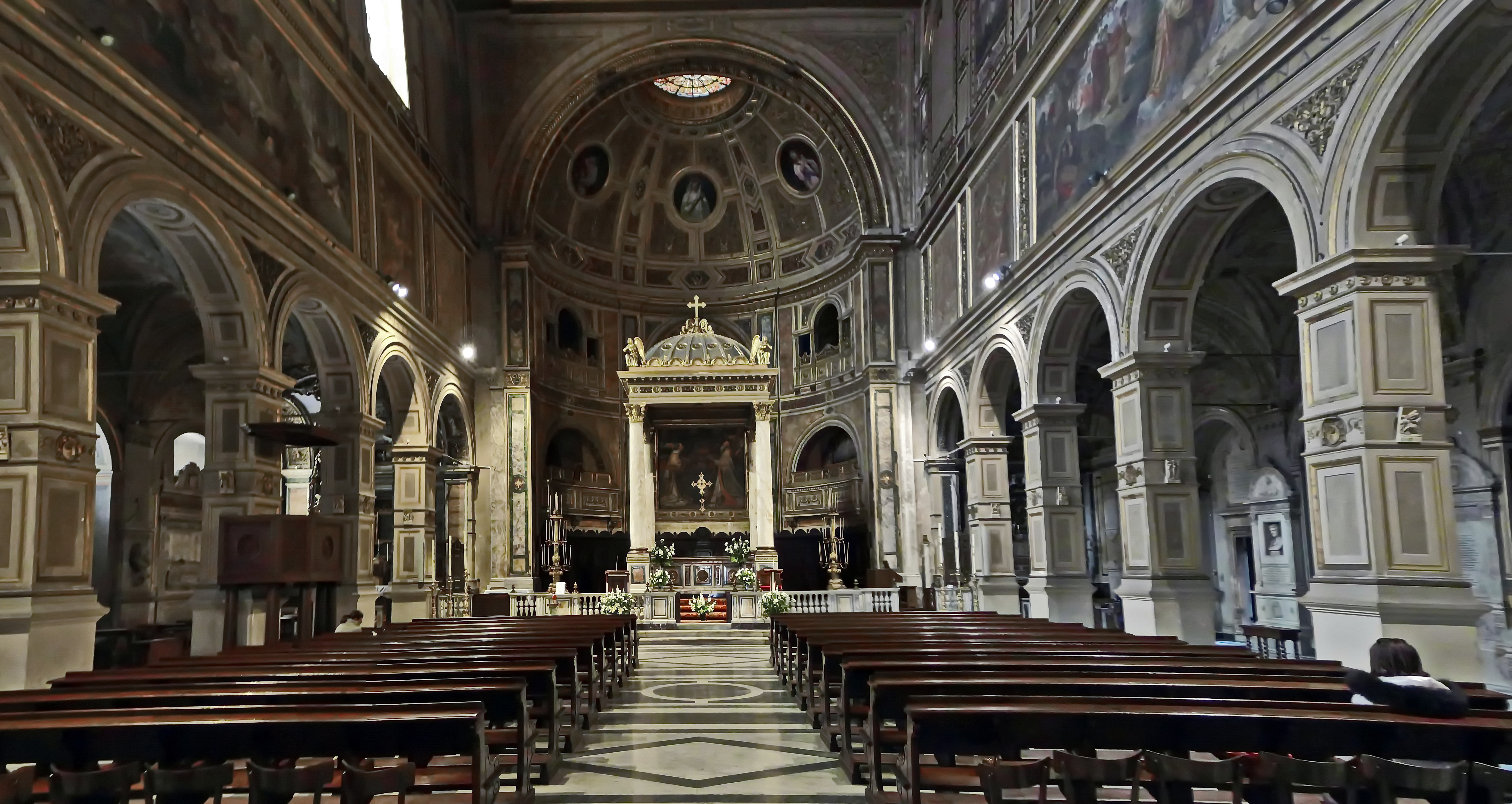 Hauptschiff